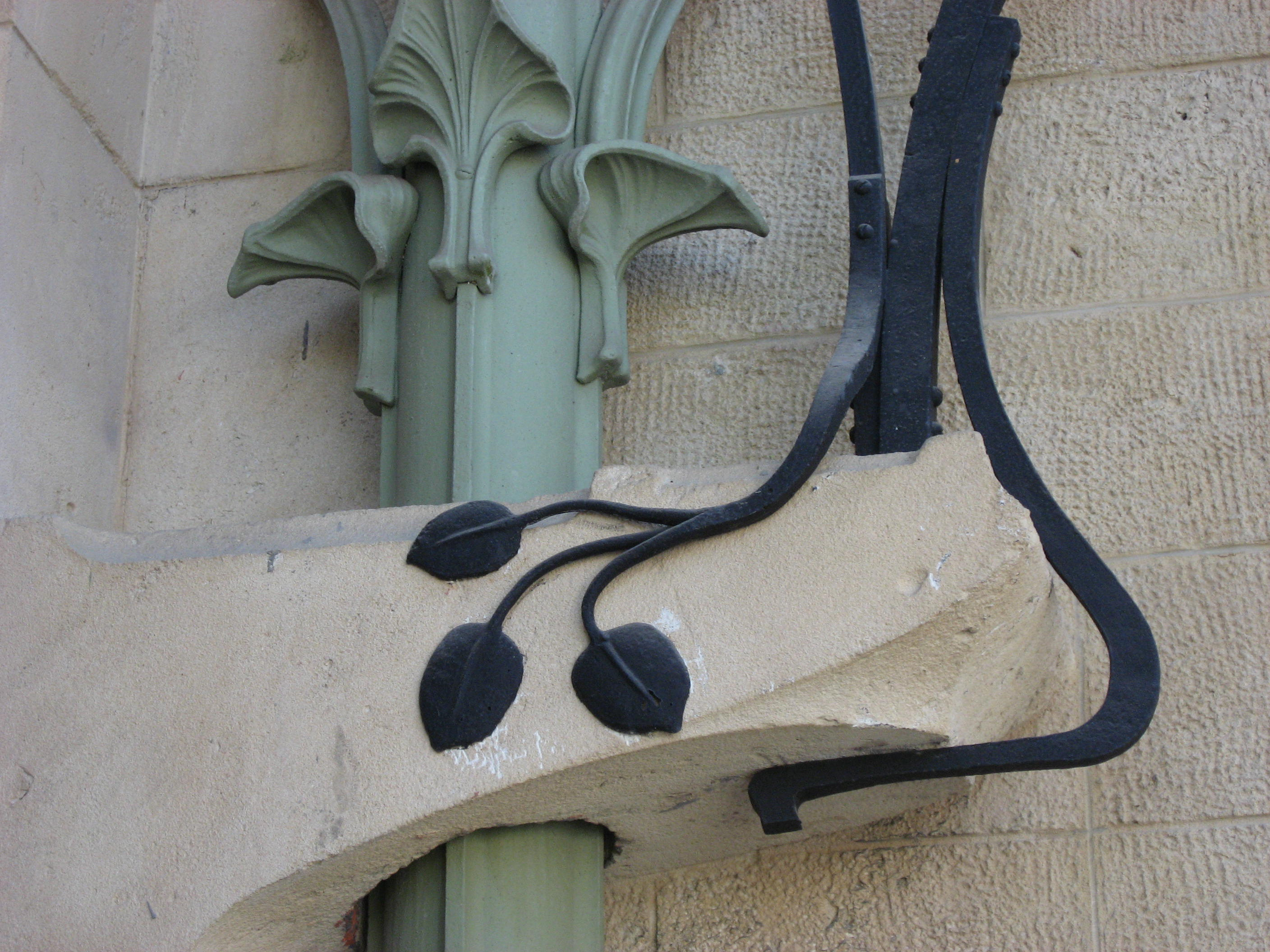 Villa Jika pour Louis Majorelle 1901-1902 1, rue Louis Majorelle 54000 Nancy Architecte: Henri Sauvage Vitraux: Jacques Grüber Ferronneries: Louis Majorelle Grès flammés: Alexandre Bigot Map: 48° 41' 8" N 6° 9' 50" E